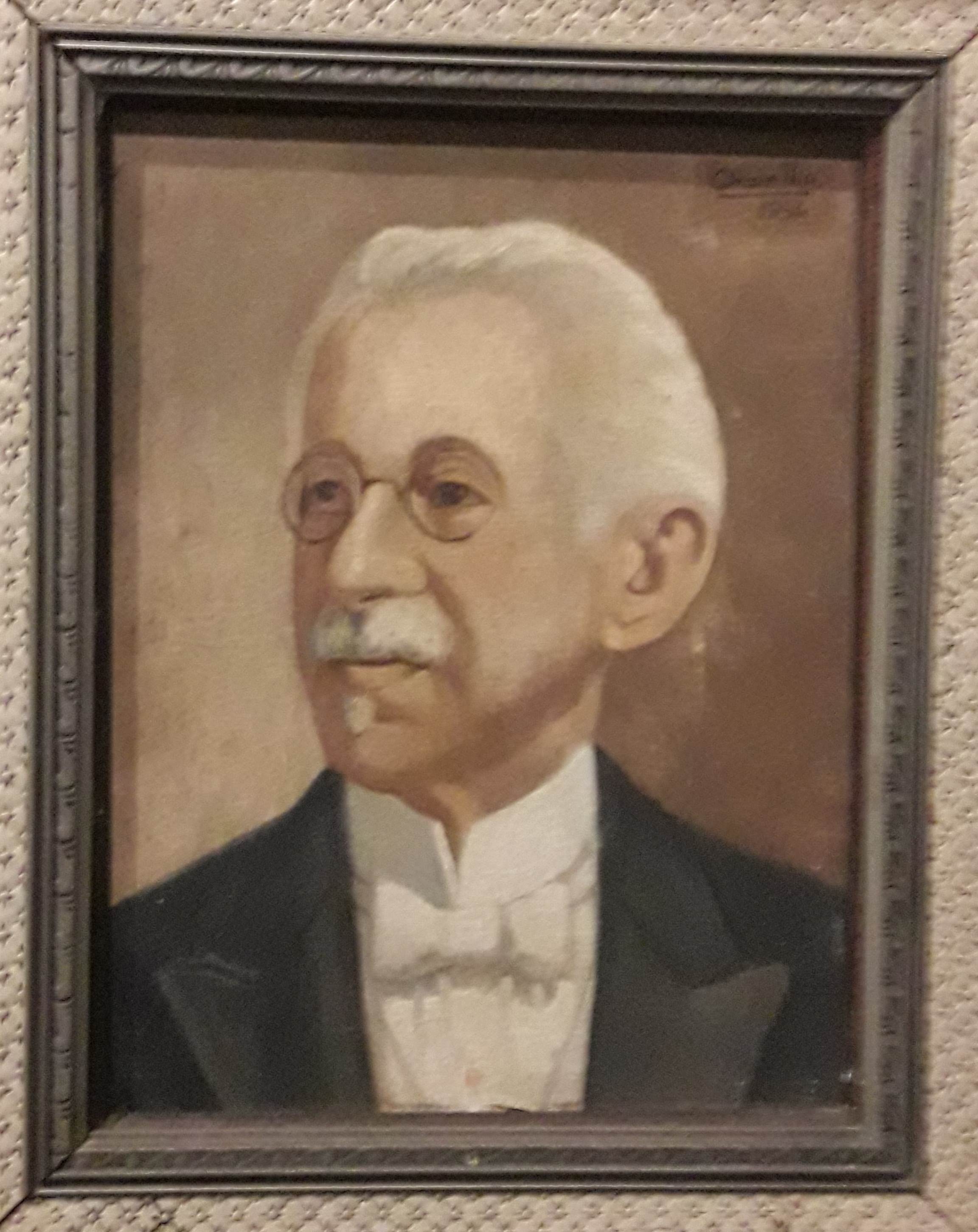 Tomás Pompeu de Sousa Brasil (II) (1852 - 1929)